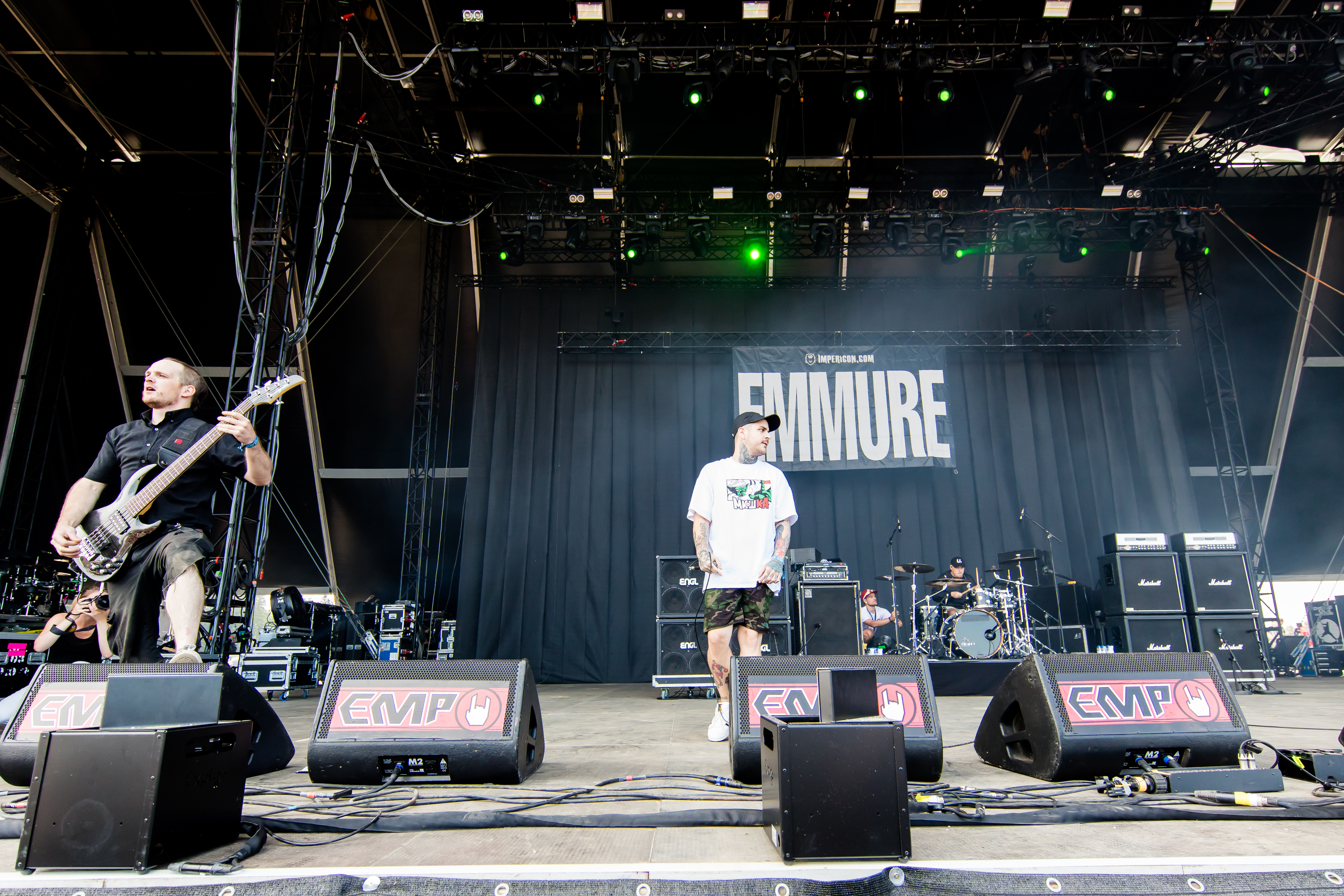 Emmure during Summer Breeze 2016 at , Dinkelsbühl, Bayern, Germany on 2016-08-18, Photo: Sven Mandel